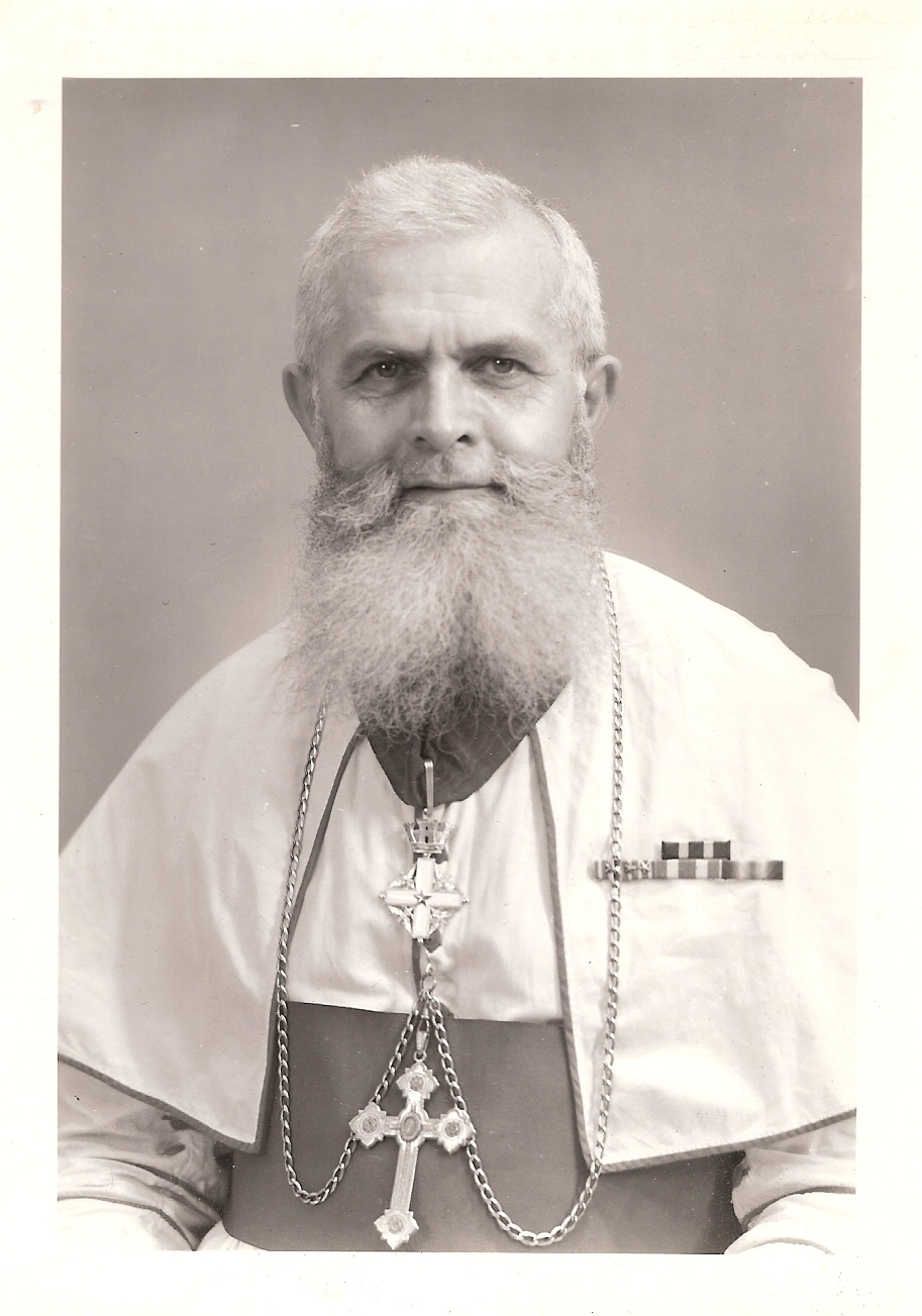 Fotografia di Mons. Ferdinando Guercilena